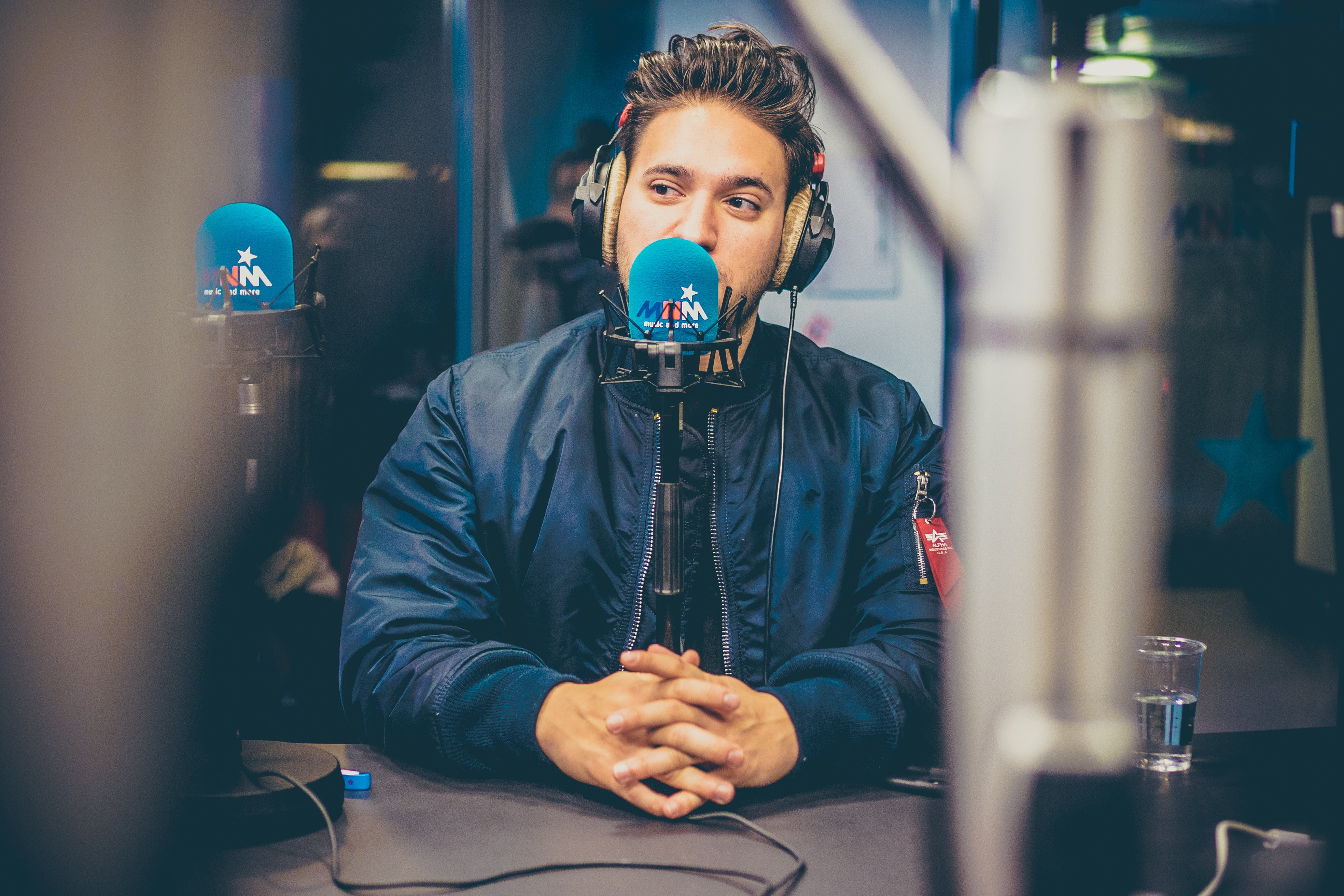 Jonas Blue in de studio van MNM